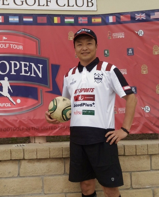 UKOPENでのkuwatahiroyuki